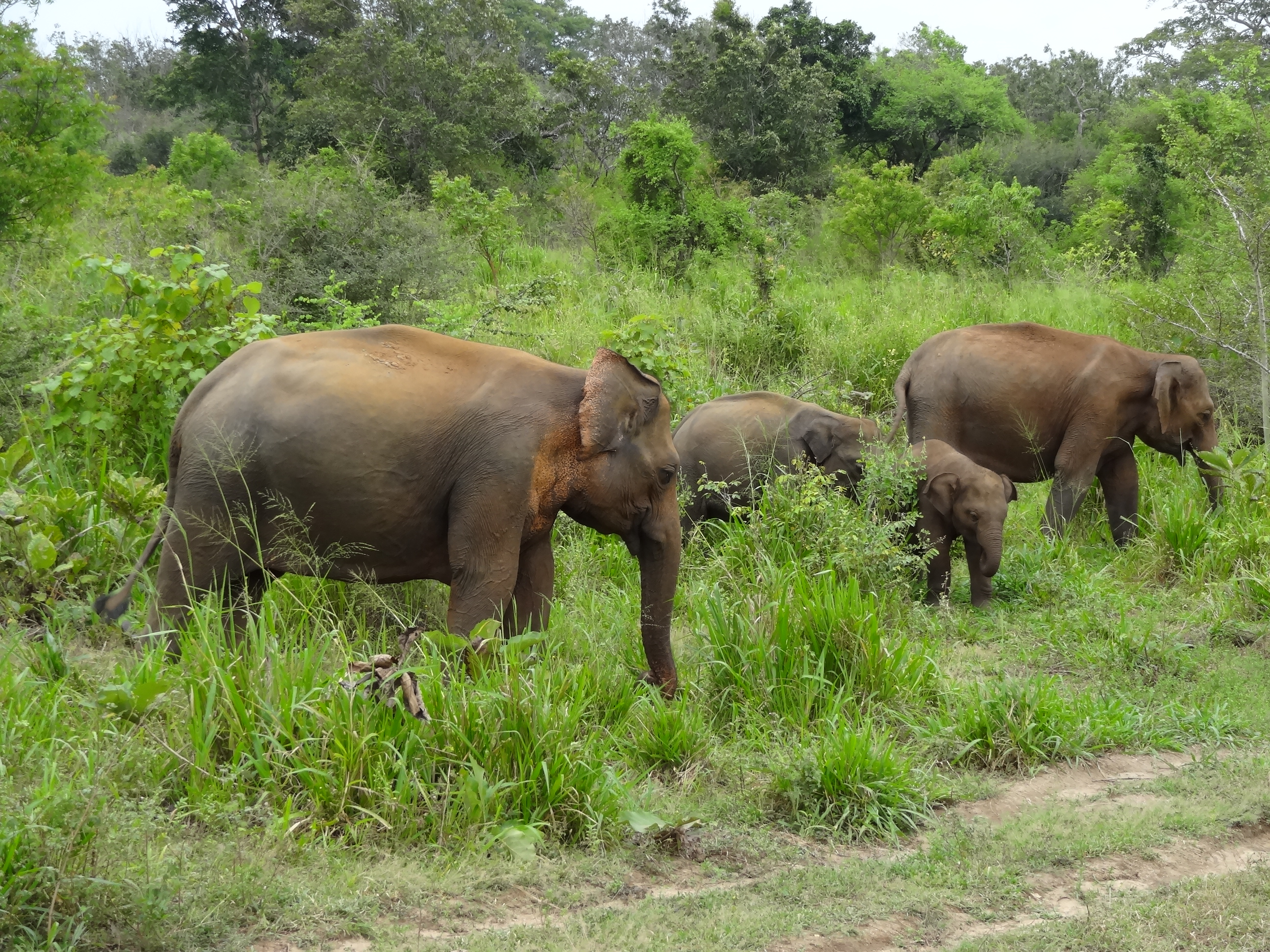 Elephas maximus maximus in Hurulu Eco Park